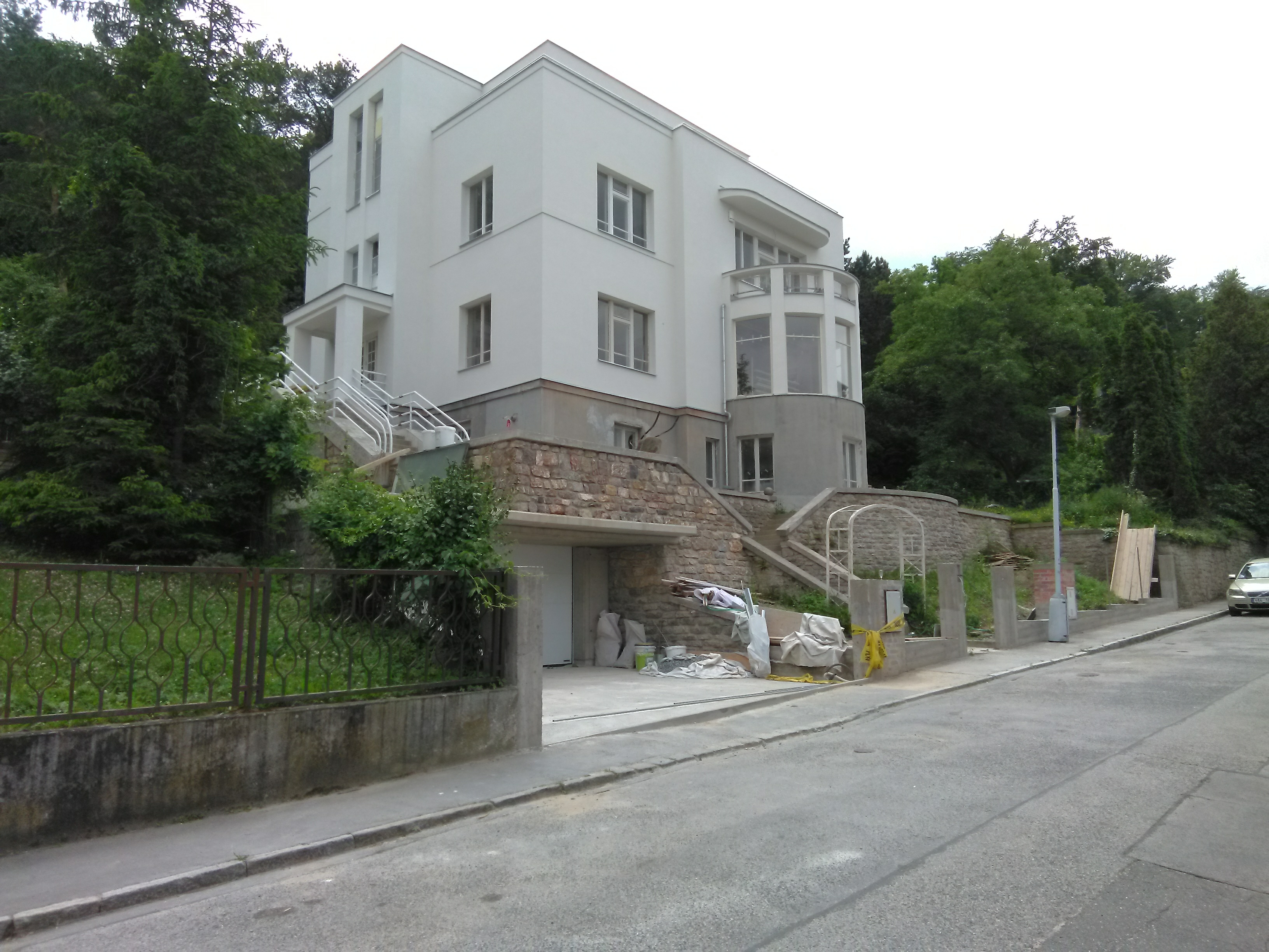 Pod Habrovou 182/10, Praha 5-Hlubočepy. Arch. Václav Hlaváček, Václav Müller, 1931.